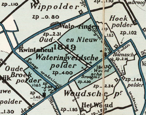 Oud-_en_Nieuw_Wateringveldsche_polder